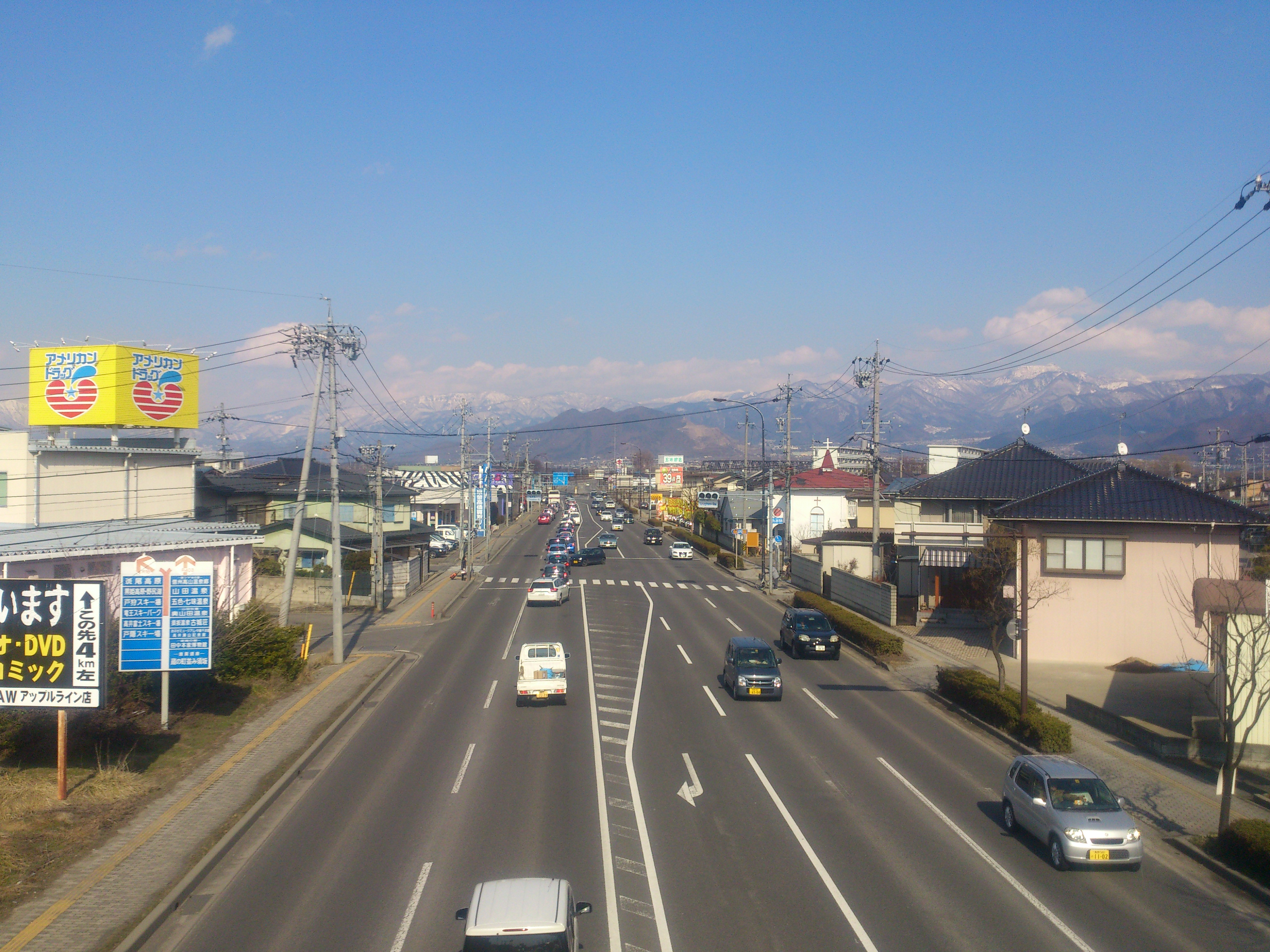 国道18号長野バイパス（長野市柳原から上越・須坂方面を望む）